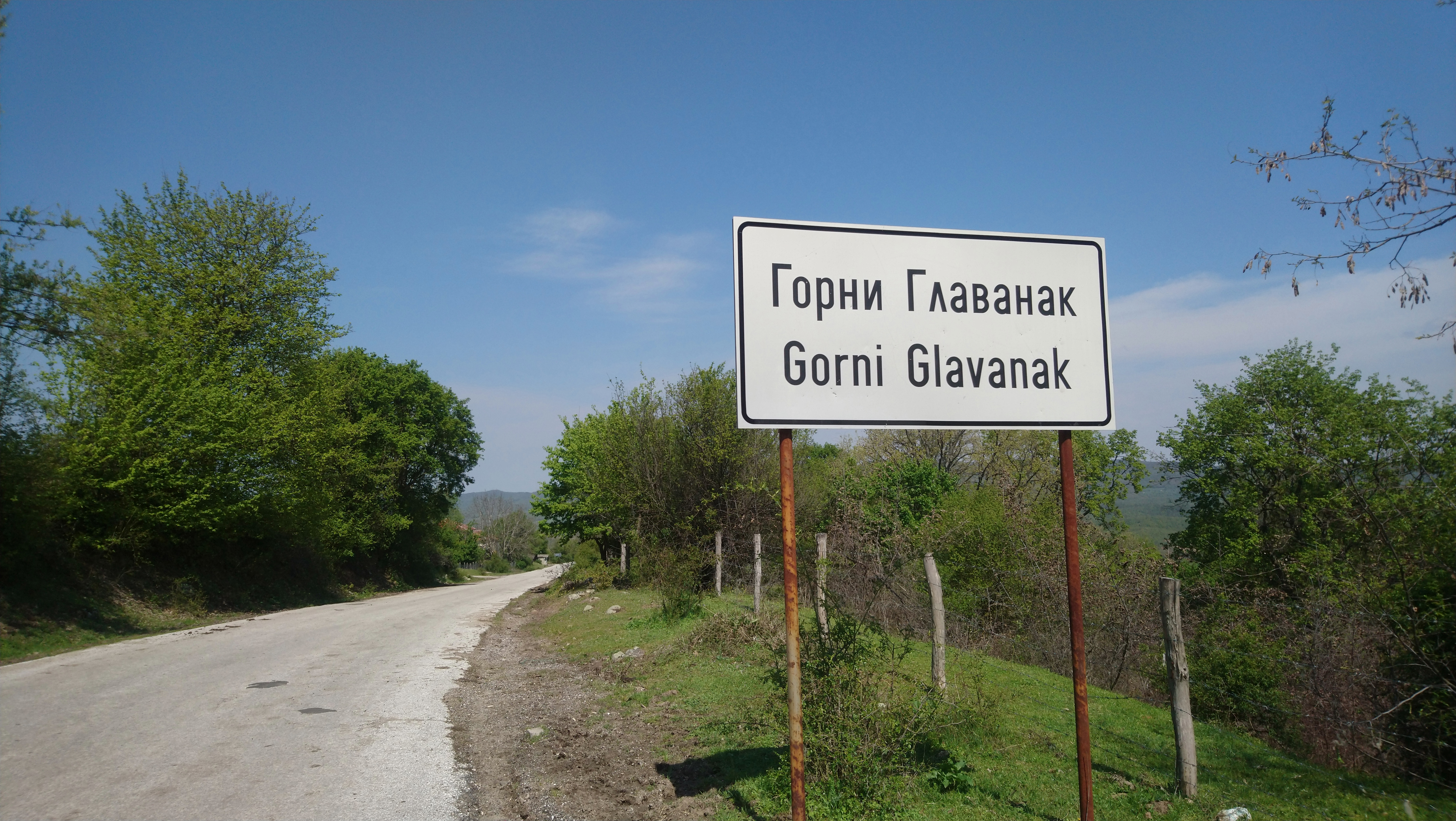 Табелата на входа на село Горни Главанак